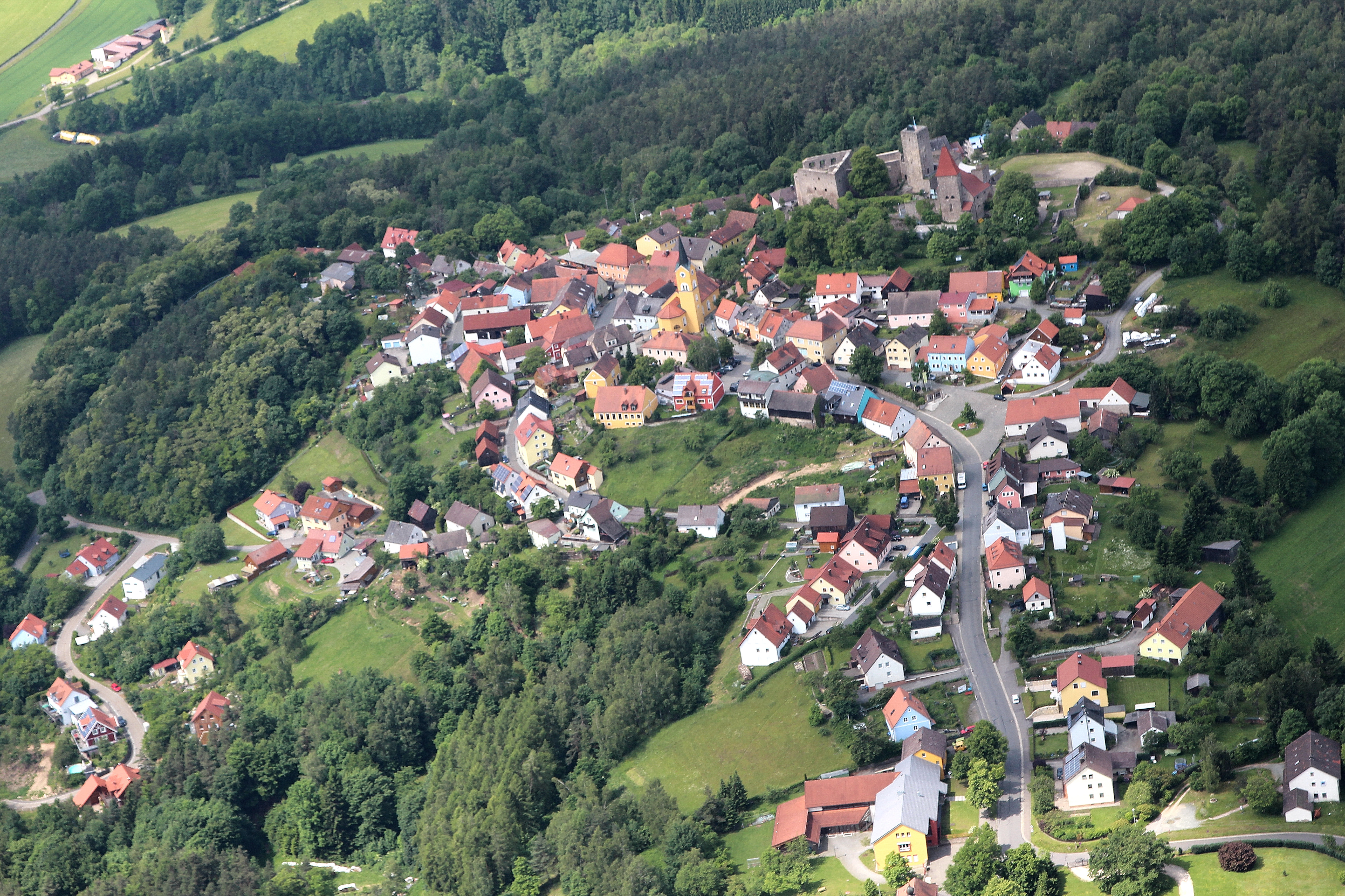 Ortschaft Leuchtenberg mit Burgruine Leuchtenberg, Landkreis Neustadt an der Waldnaab, Oberpfalz, Bayern (2014)